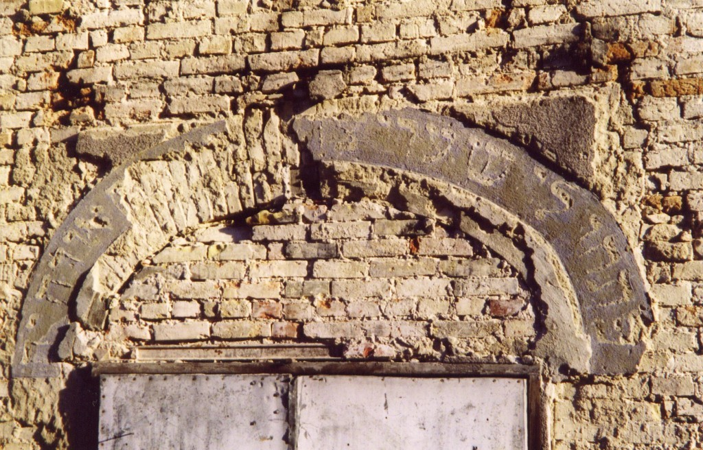 Napis na synagodze w Międzyrzeczu